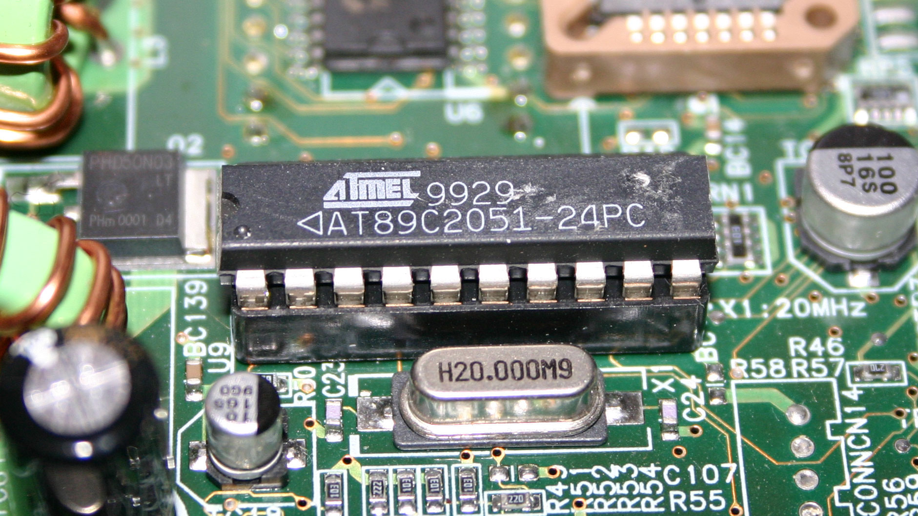 An Atmel 89c2051 microcontroller